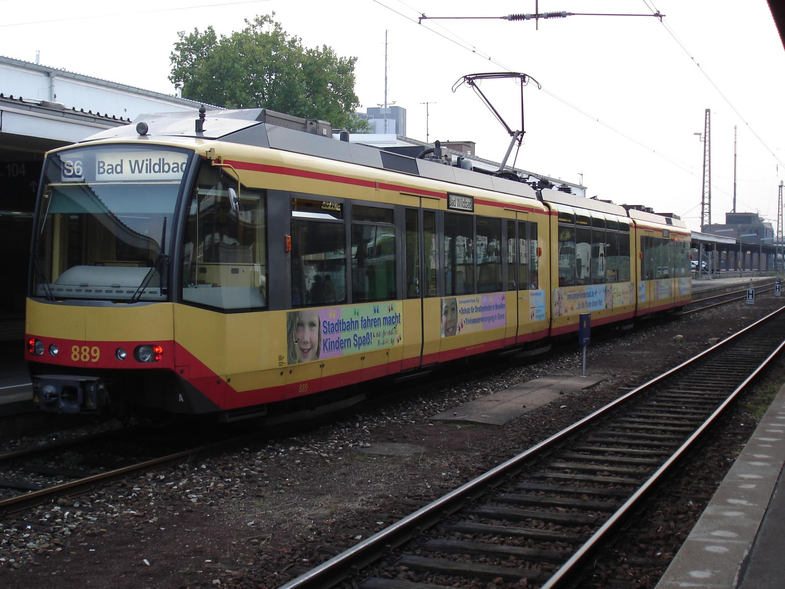 889 im Bahnhof Pforzheim